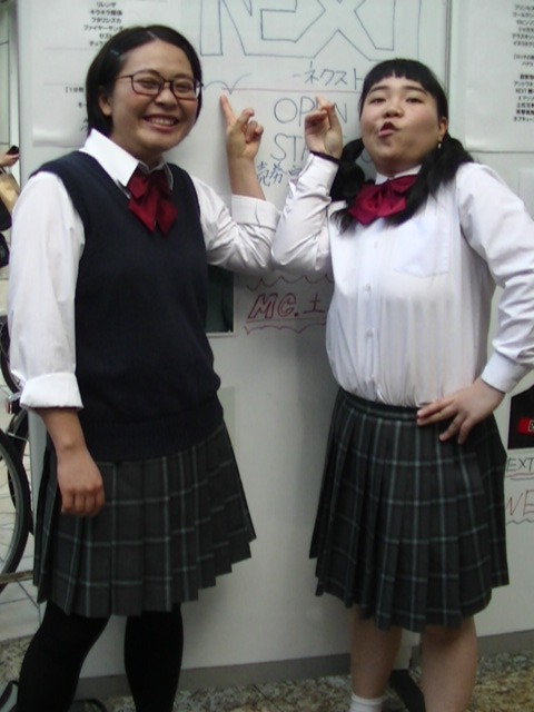 はなしょー (2018年3月11日)